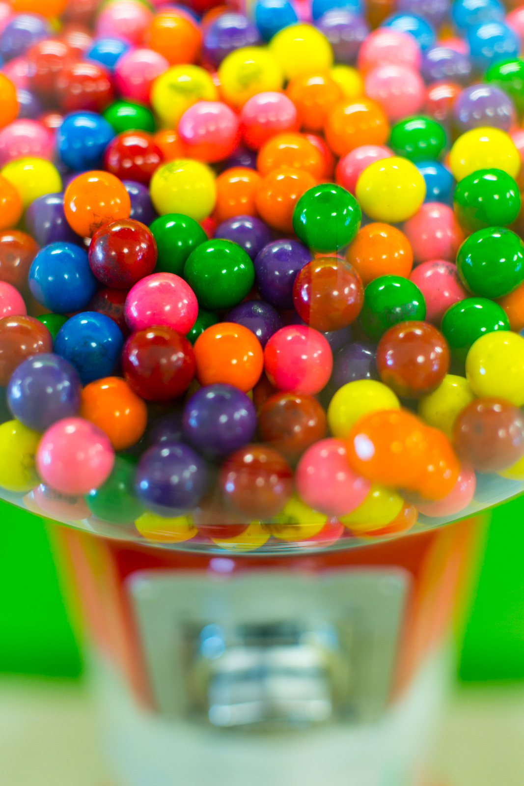 gumballs